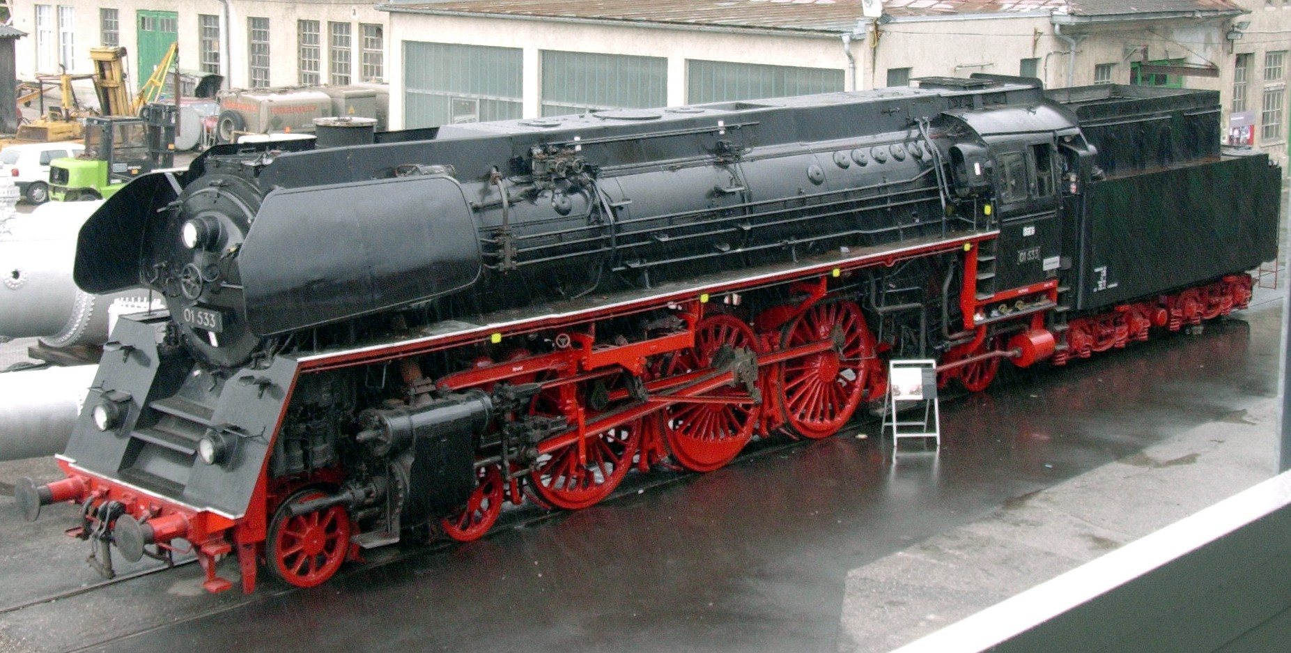 Dampflokomotive der Baureihe 01.5 der Österreichische Gesellschaft für Eisenbahngeschichte.